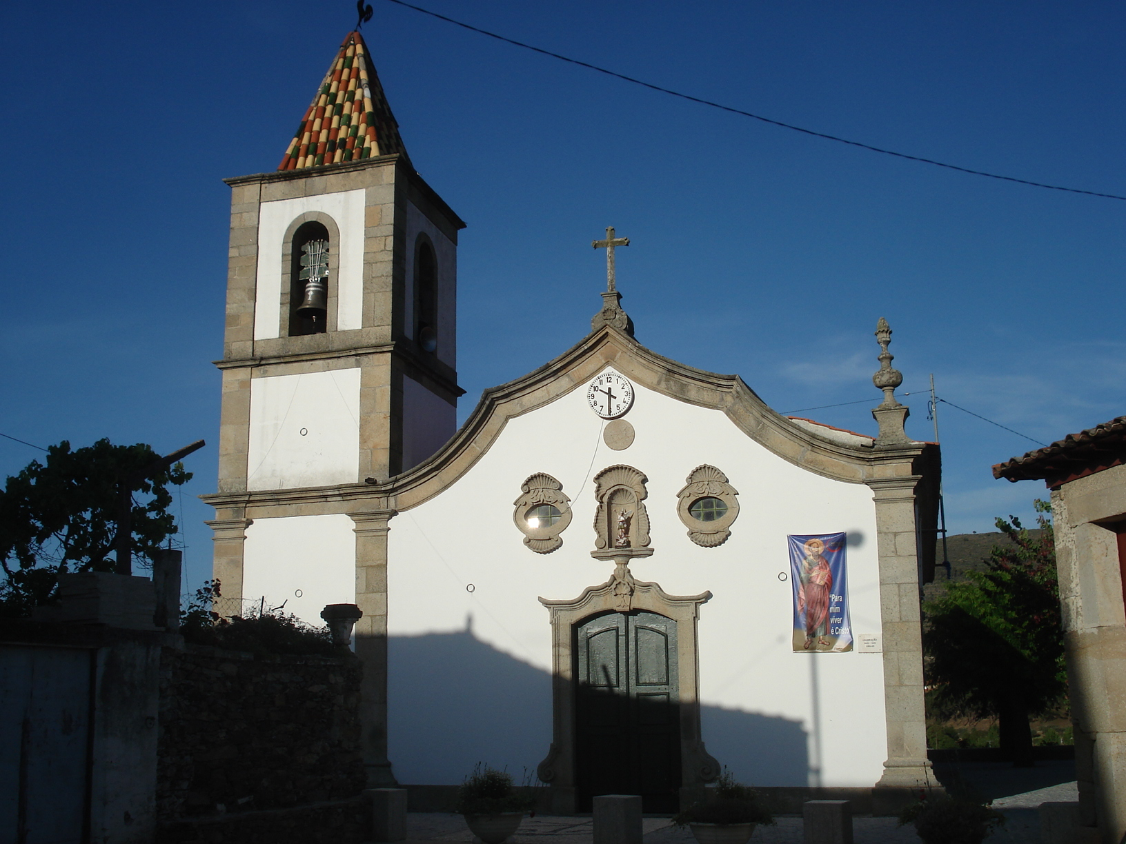 fachada principal da Igreja